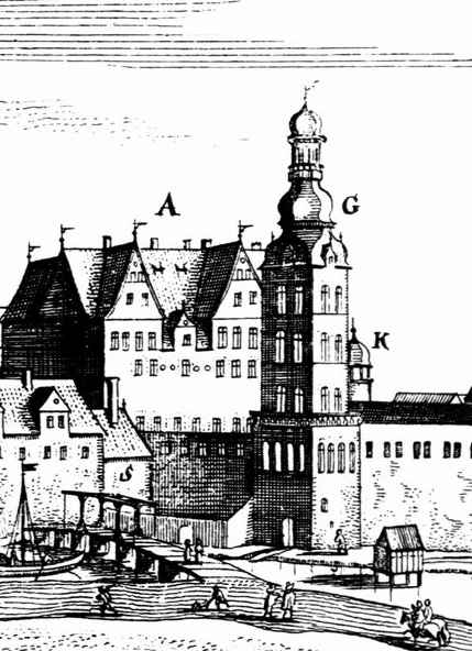 Ansicht (Detail) der Berliner "Wasserkunst", eines alten Wasserturms in Berlin